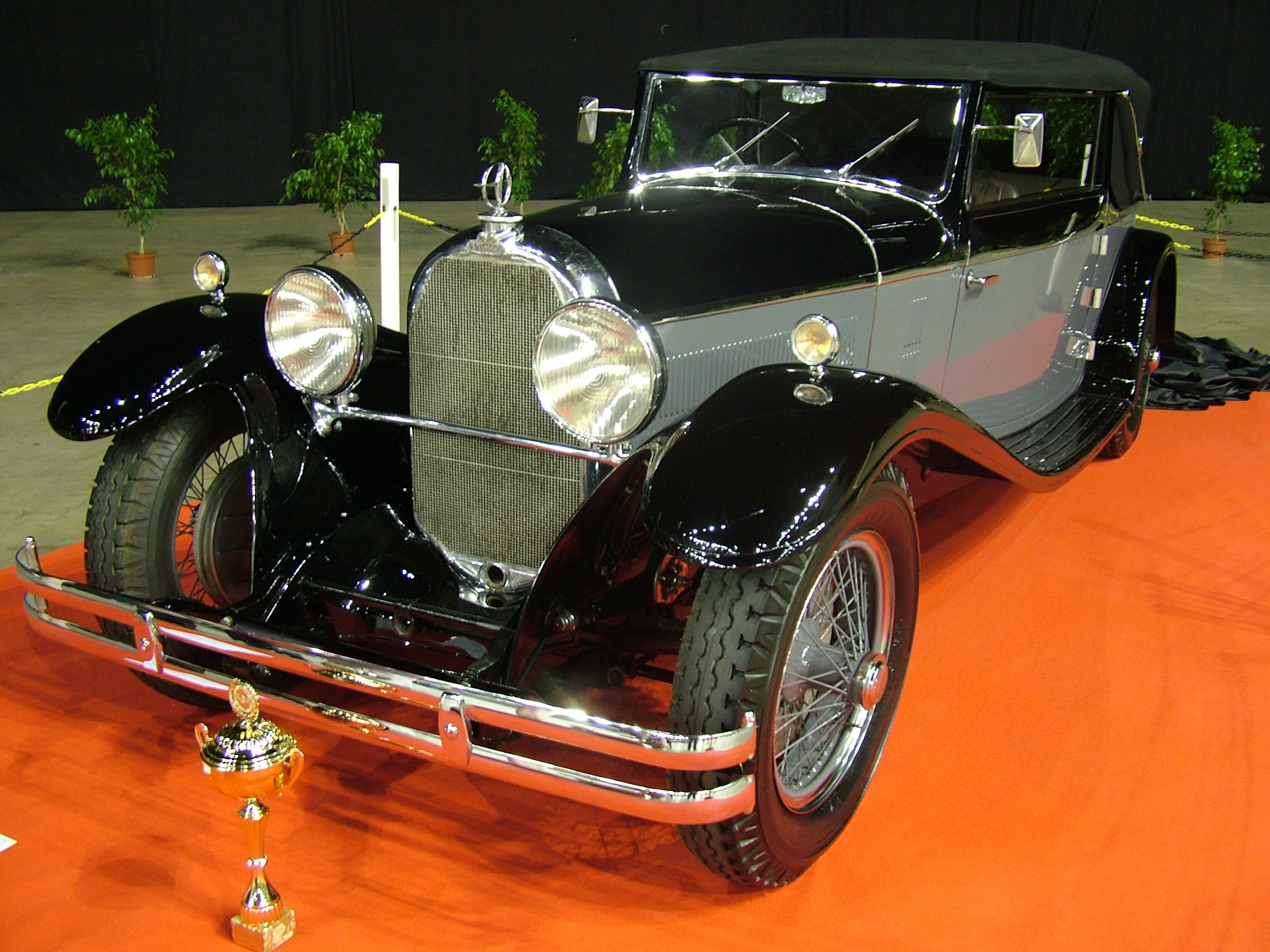 Austro-Daimler AD 12/70, 1930